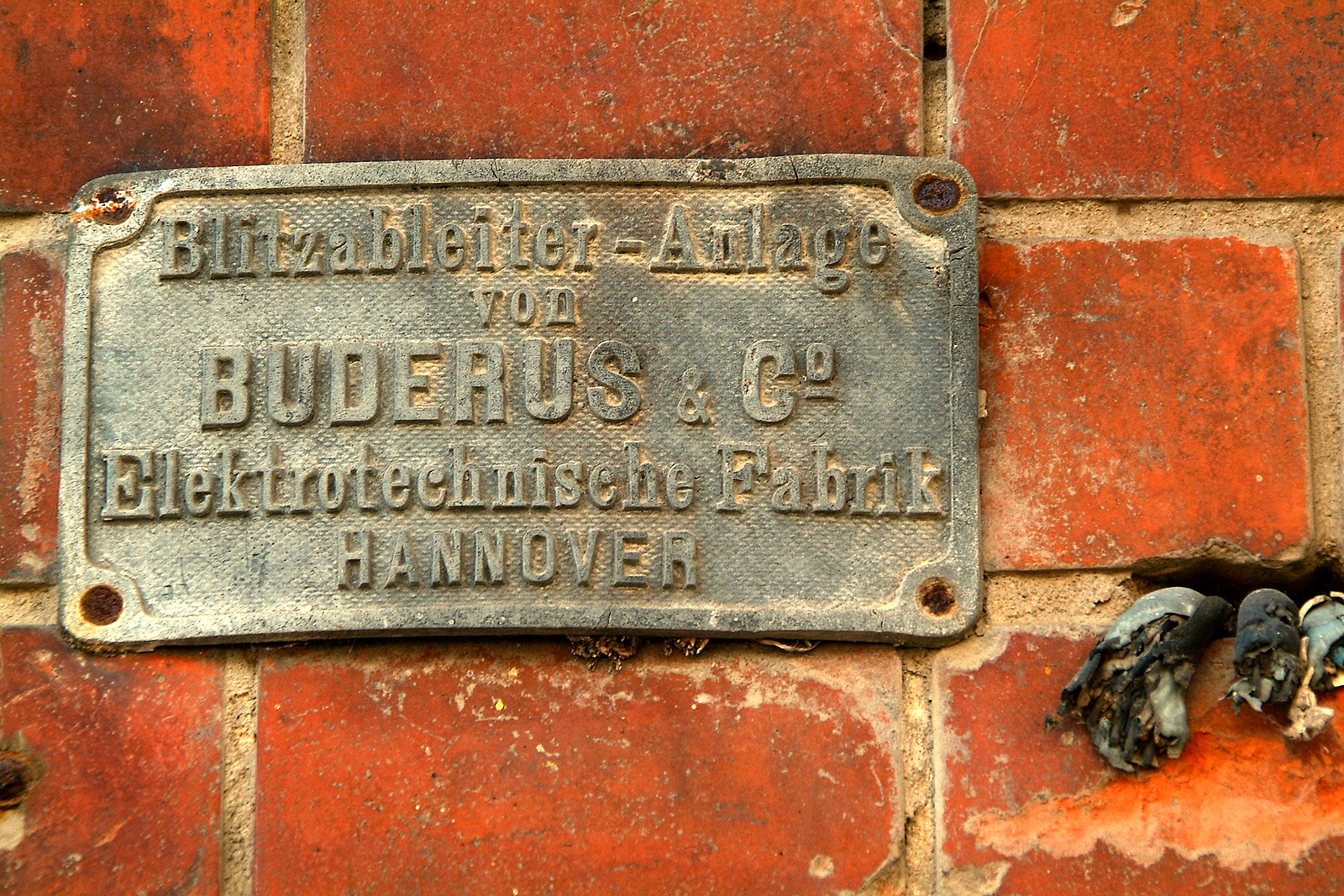 Metallschild am Eingang zum Kuhstall der denkmalgeschützten Hofanlage Freidingstraße 4 in Hannover, Stadtteil Anderten: "Blitzableiter-Anlage von Buderus & Co., Elektrotechnische Fabrik, Hannover" ...